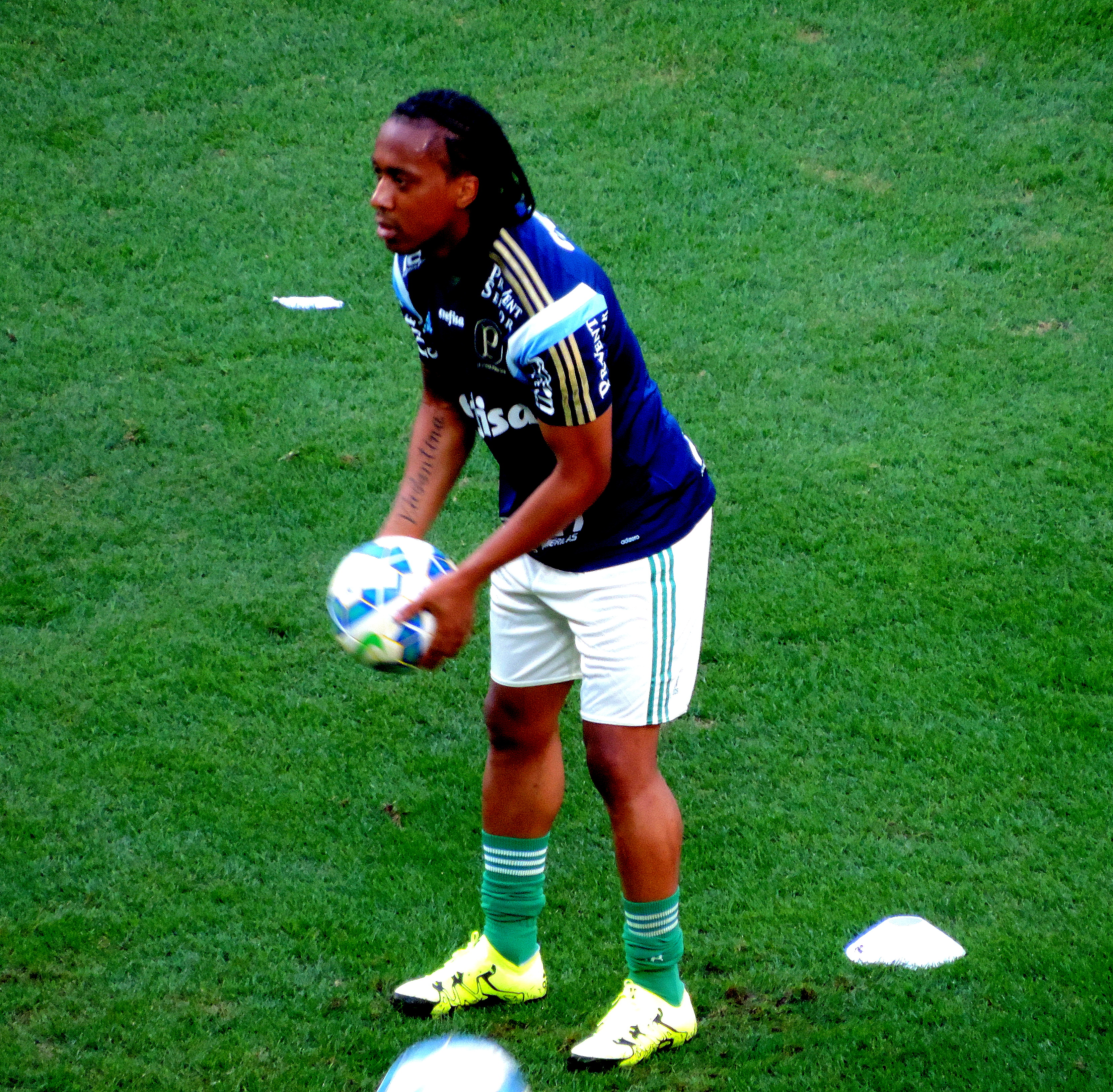 Arouca. Foto: Roberto Sabino